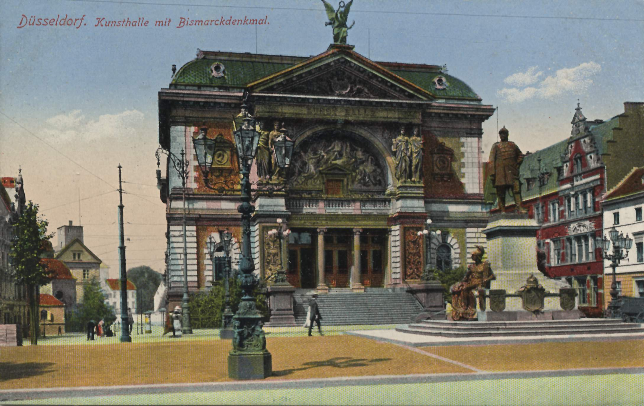 Bismarckdenkmal, Kunsthalle